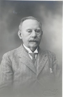 Ernst Friedrich Blessig